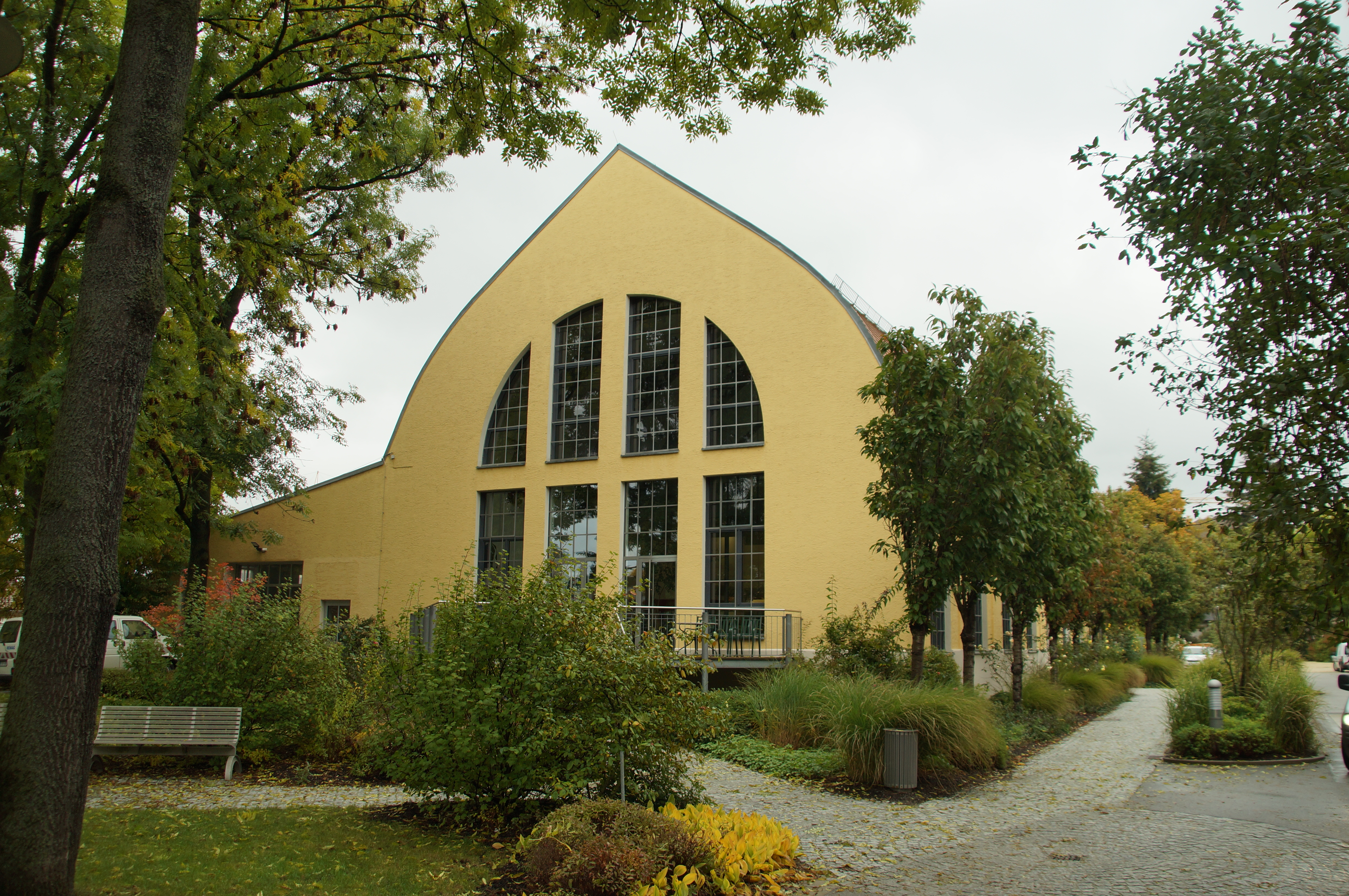 Städtisches Gaswerk Regensburg